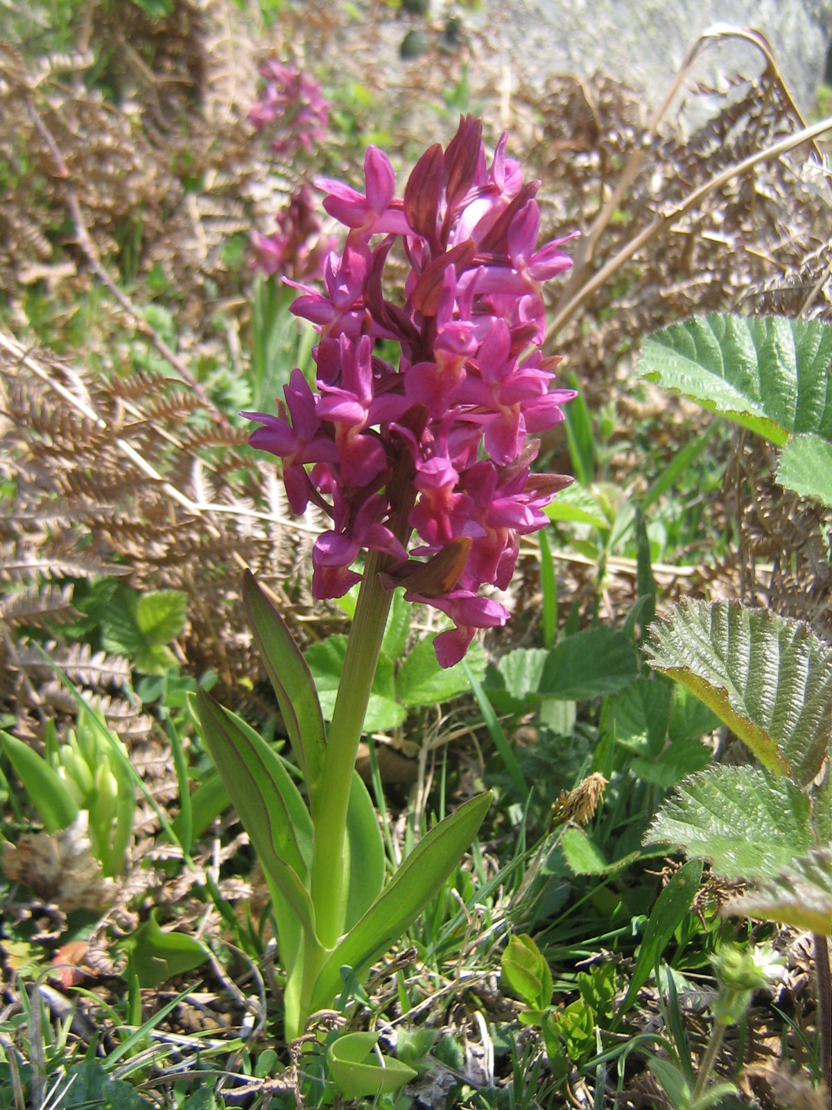 Orchis sureau (Dactylorhiza sambucina) dans une lande à genêts purgatifs et à fougères sur le versant est des monts d'Aubrac (Lozère, Massif central, France)